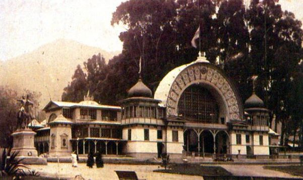 Pabellon Industrial expocicion del centenario 1910 en Bogotá.